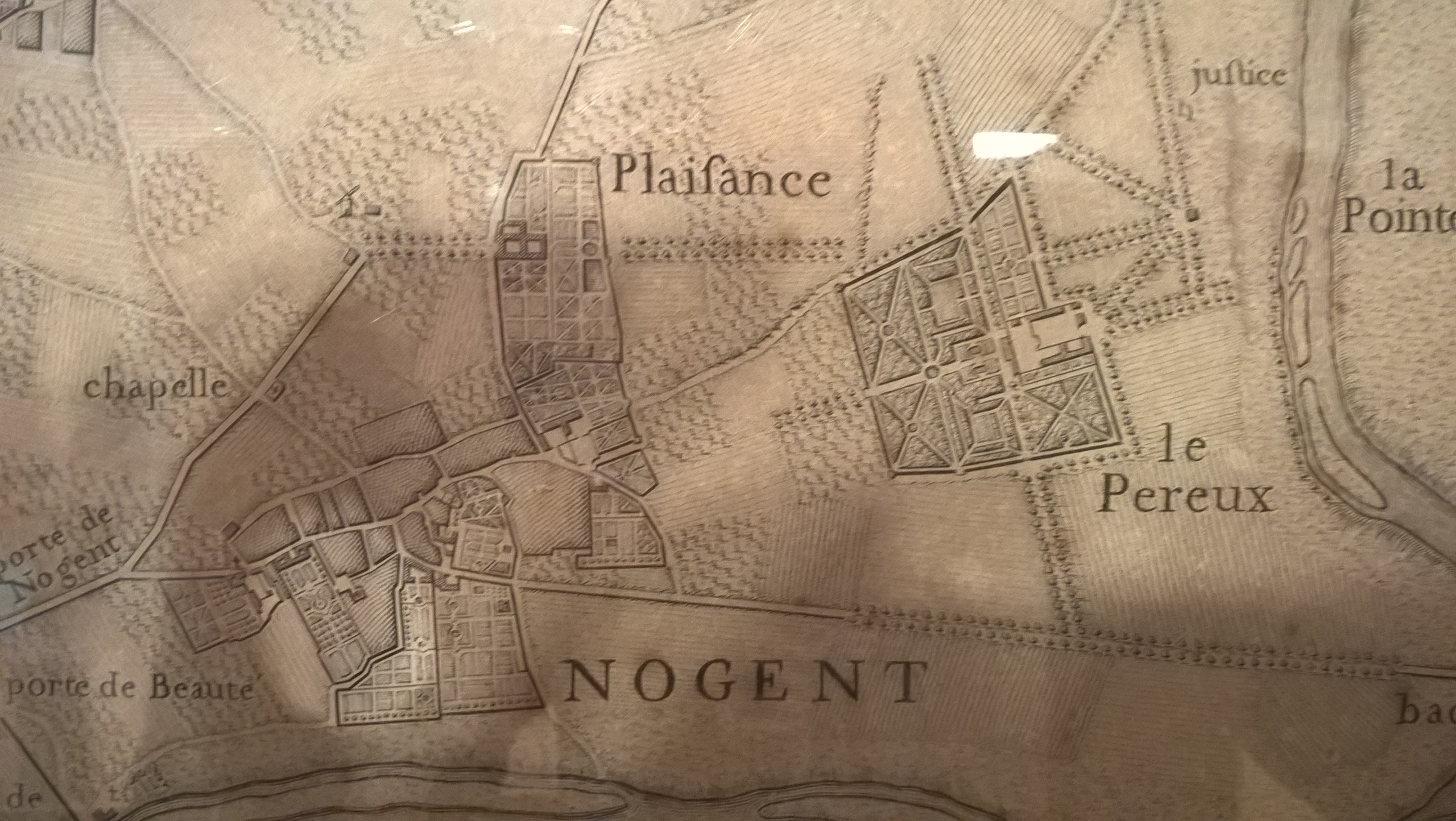 Détail d'une carte figurant la ville de Nogent-sur-Marne et de ses environs. Elle a été exécutée par l'abbé Jean Delagrive, en 1740. Cette carte est actuellement exposée au Musée de Nogent-sur-Marne.